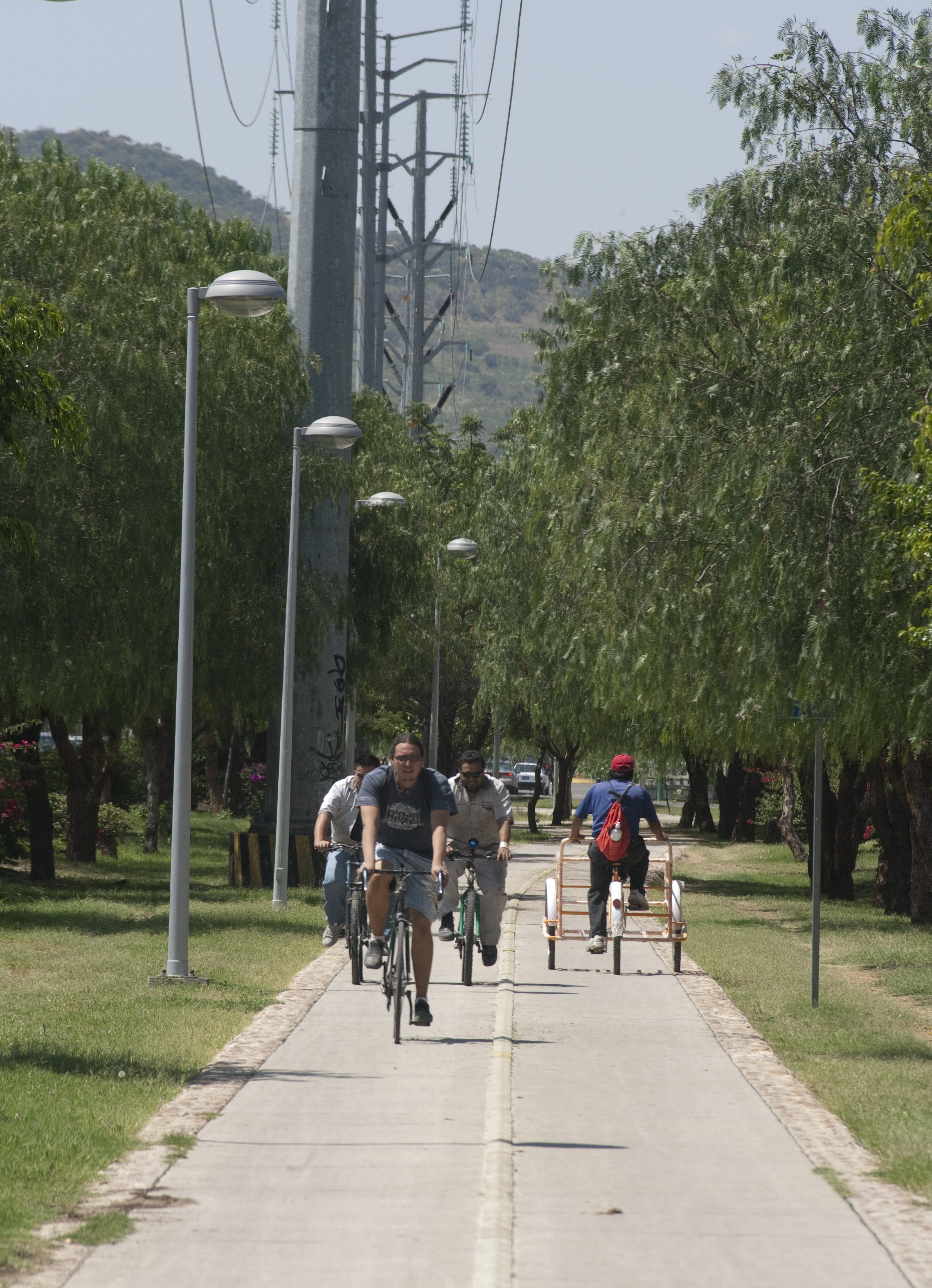 Ciclovias de la ciudad de León conforman un cicloférico .